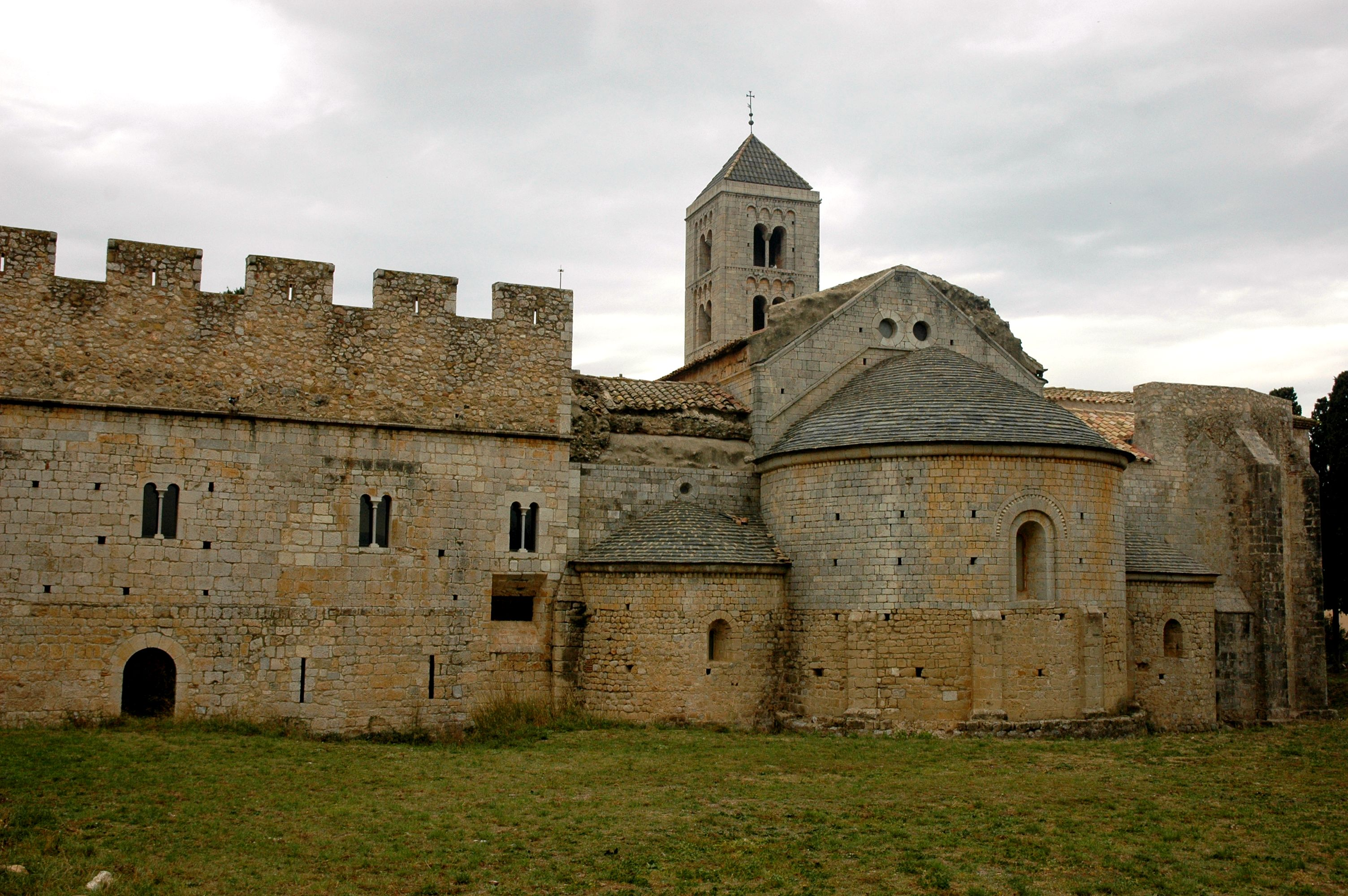 Santa Maria de Vilabertran - Absis